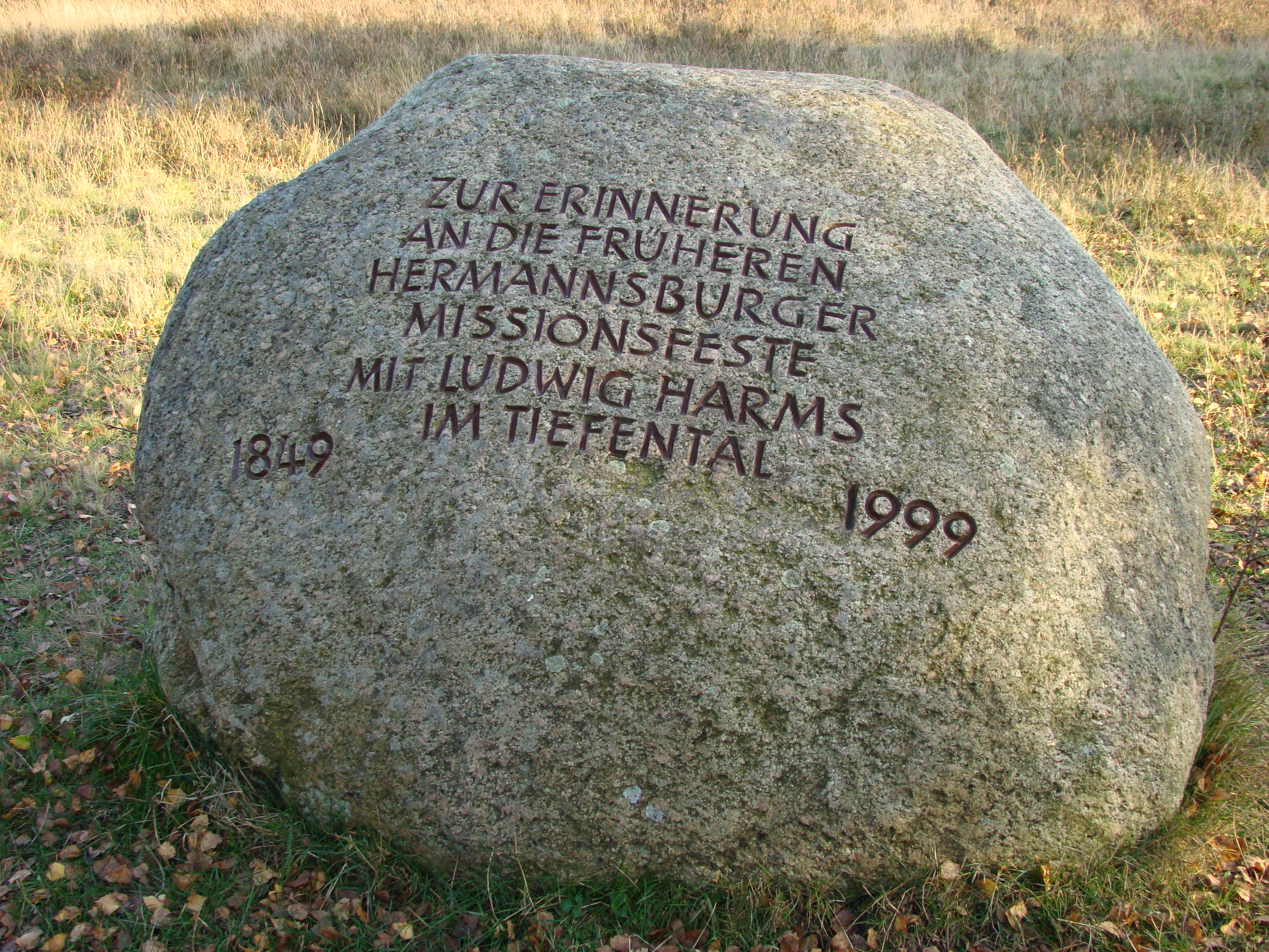 Gedenkstein zum Missionsfest mit Ludwig Harms in Tiefental. Der Stein wurde zum 150-jährigen Bestehen der Hermannsburger Mission gesetzt. Er erinnert daran, dass sich hier im Tiefental tausende Menschen einfanden um das Missionsfest zu feiern.